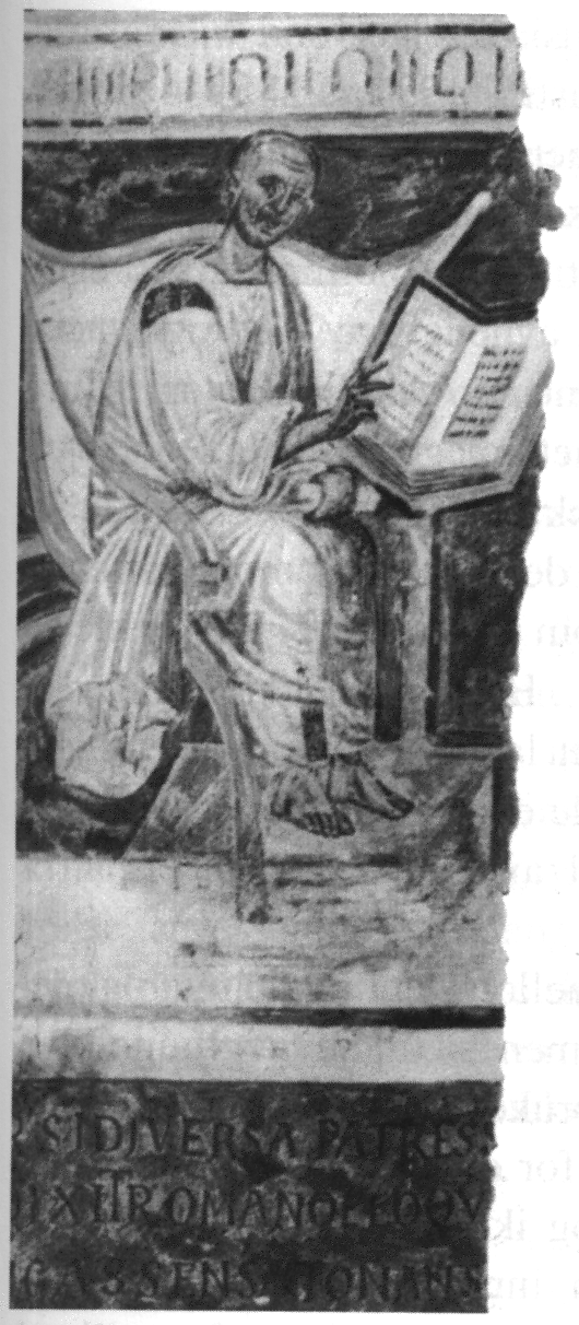 Augustin.